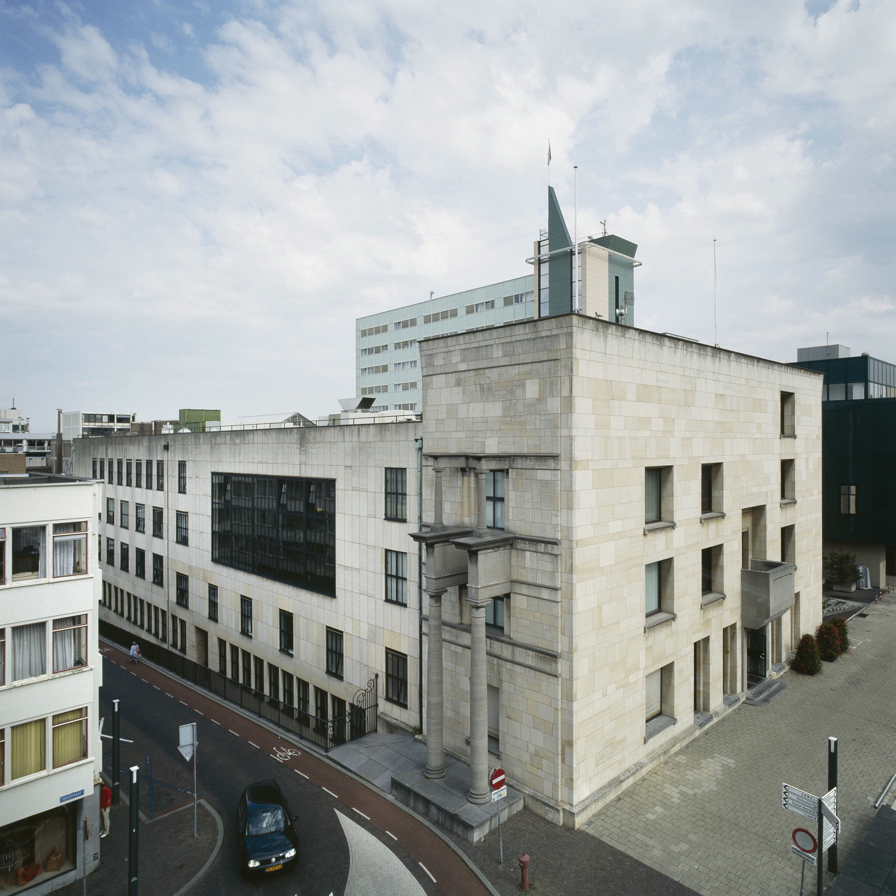 Stadhuis: Overzicht stadhuis, voorgevel en linker zijgevel (zijde: Raadhuisplein) (opmerking: Adres : Geleenstraat 27 - Raadhuisplein)